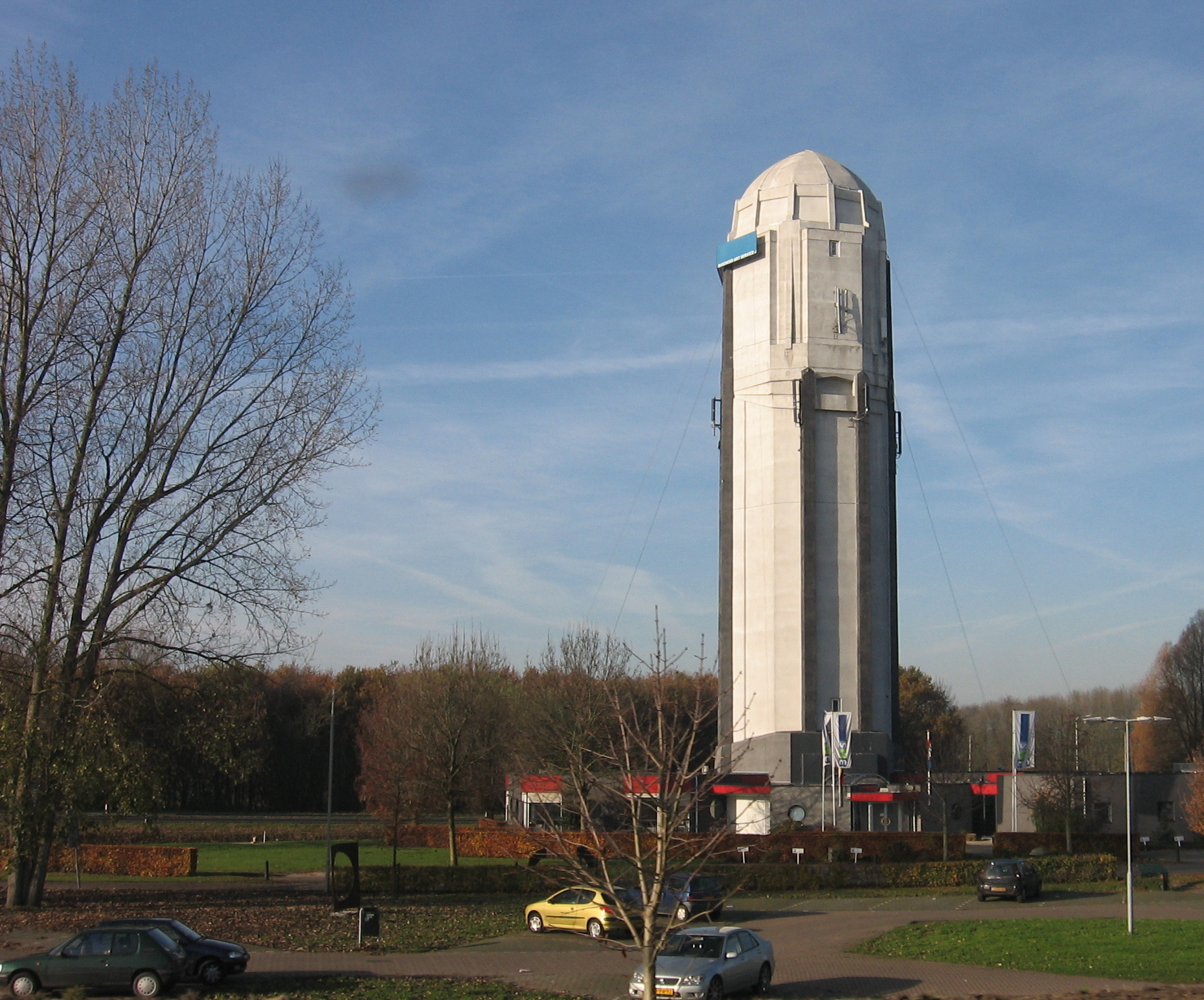 Raamsdonksveer - watertoren